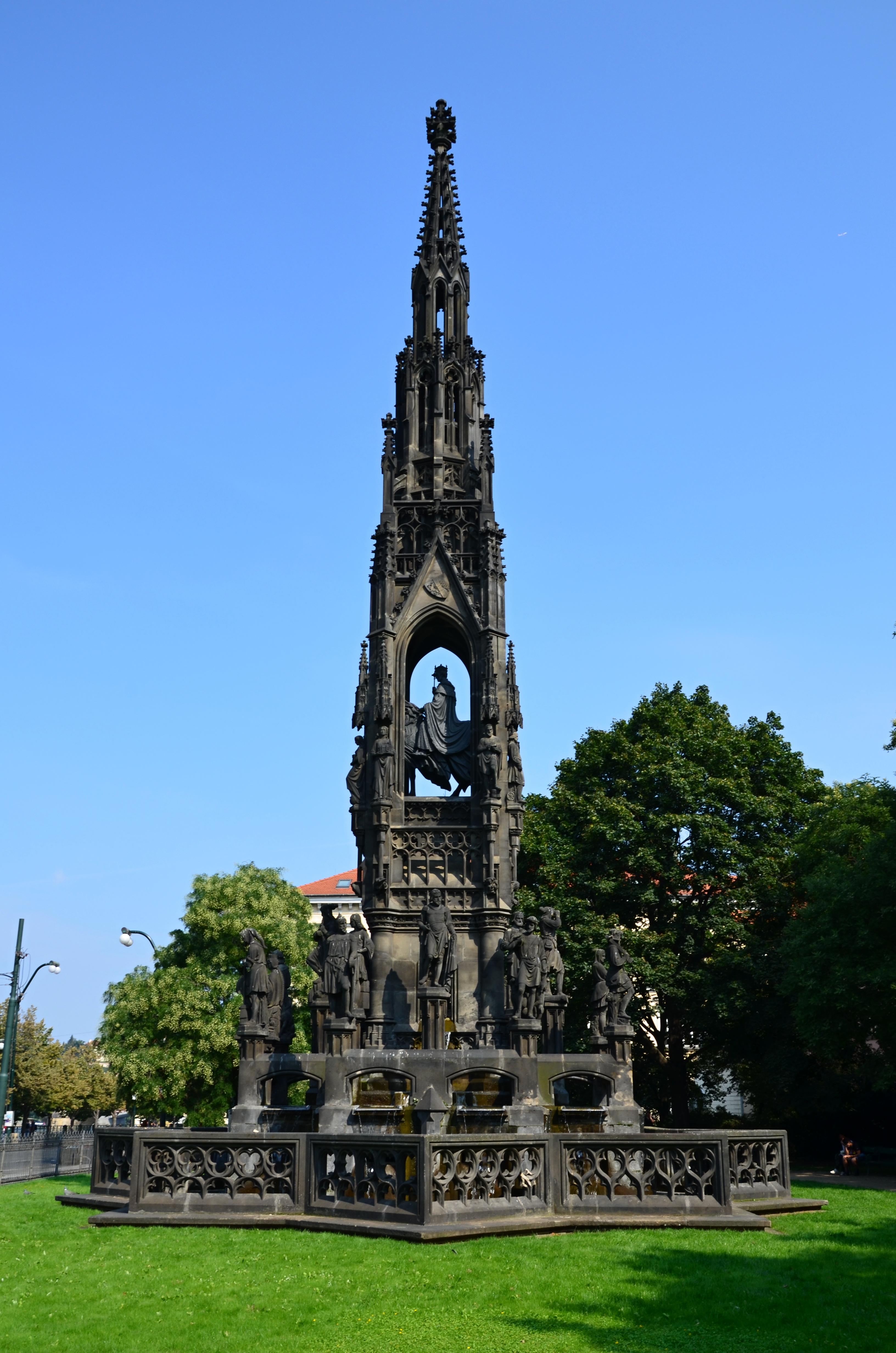 Pomník císaře Františka I. (Staré Město), Praha 1, Smetanovo nábř., Staré Město